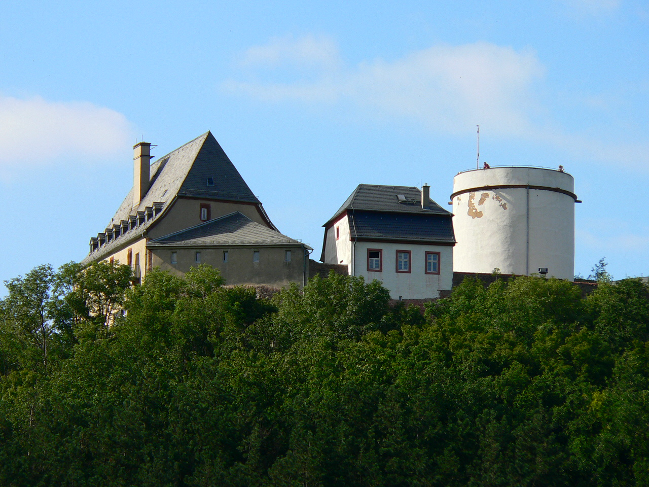 Veste Otzberg - Südostansicht